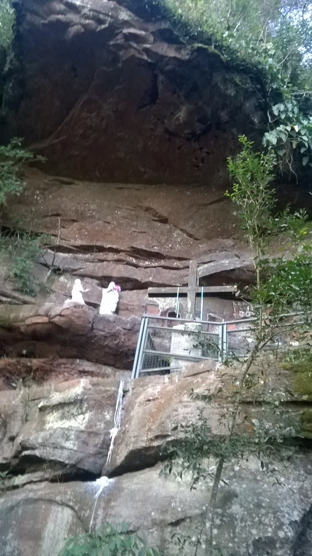 Vista de baixo da gruta onde costumava repousar o conhecido monge João Maria, figura mítica da história paranaense. A parede negativa acima chama atenção, bem como a interferência dos elementos religiosos adicionados pela ação humana. Fotografia tirada na cidade da Lapa, Paraná.